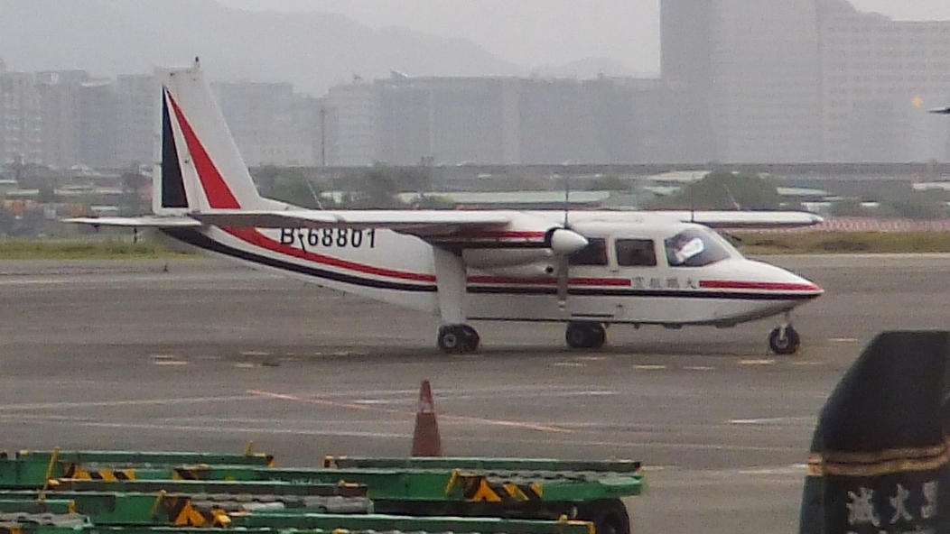 臺北松山機場停機坪的大鵬航空Britten Norman BN-2-2-26 Islander型雙引擎螺旋槳航照機B-68801，本機已於2012年8月30日因飛行事故墜毀於臺灣花蓮縣卓溪鄉。